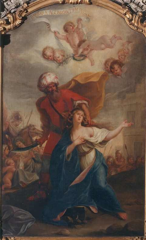 Martyre de H.Barbara par Maximilien De Haese. H.S.T de 298x184 cm, datée 1752. Cette peinture d'autel est tout d'abord faussement attribuée à Peter Francis Pau. Elle est conservée à l'Église Saint-Martin d'Alost.